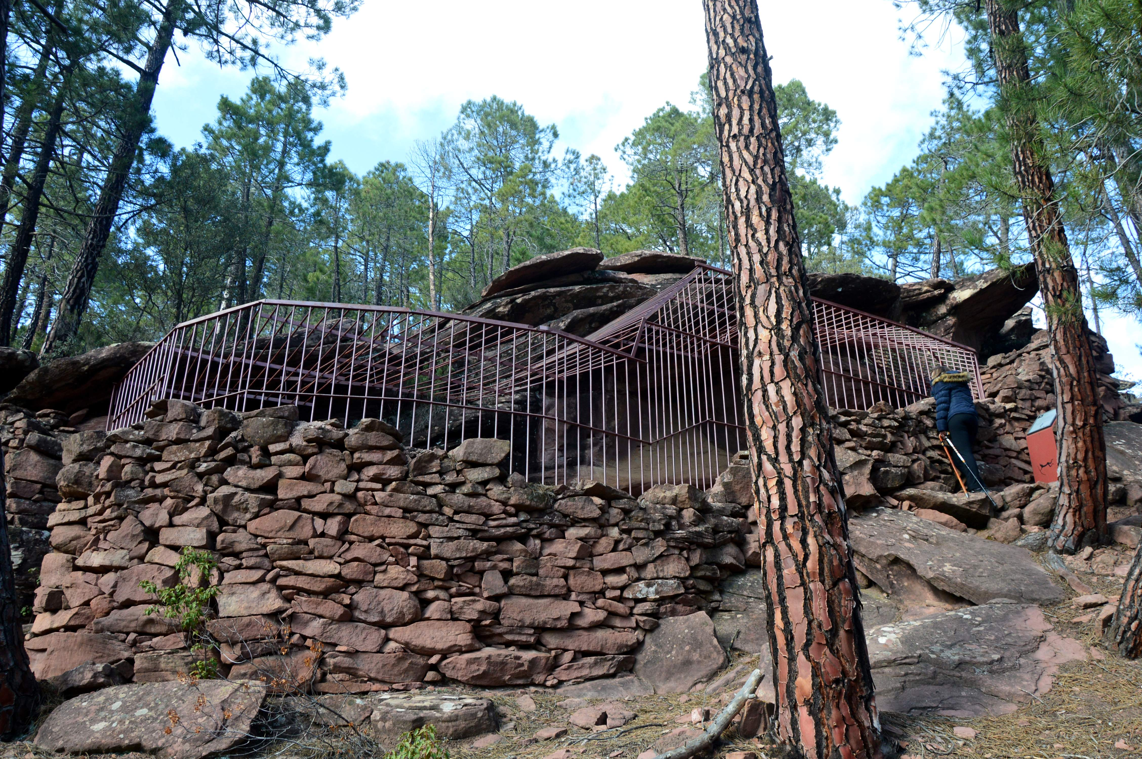 Abrigo de la Paridera de Tormón, Parque Cultural de Albarracín (2018).